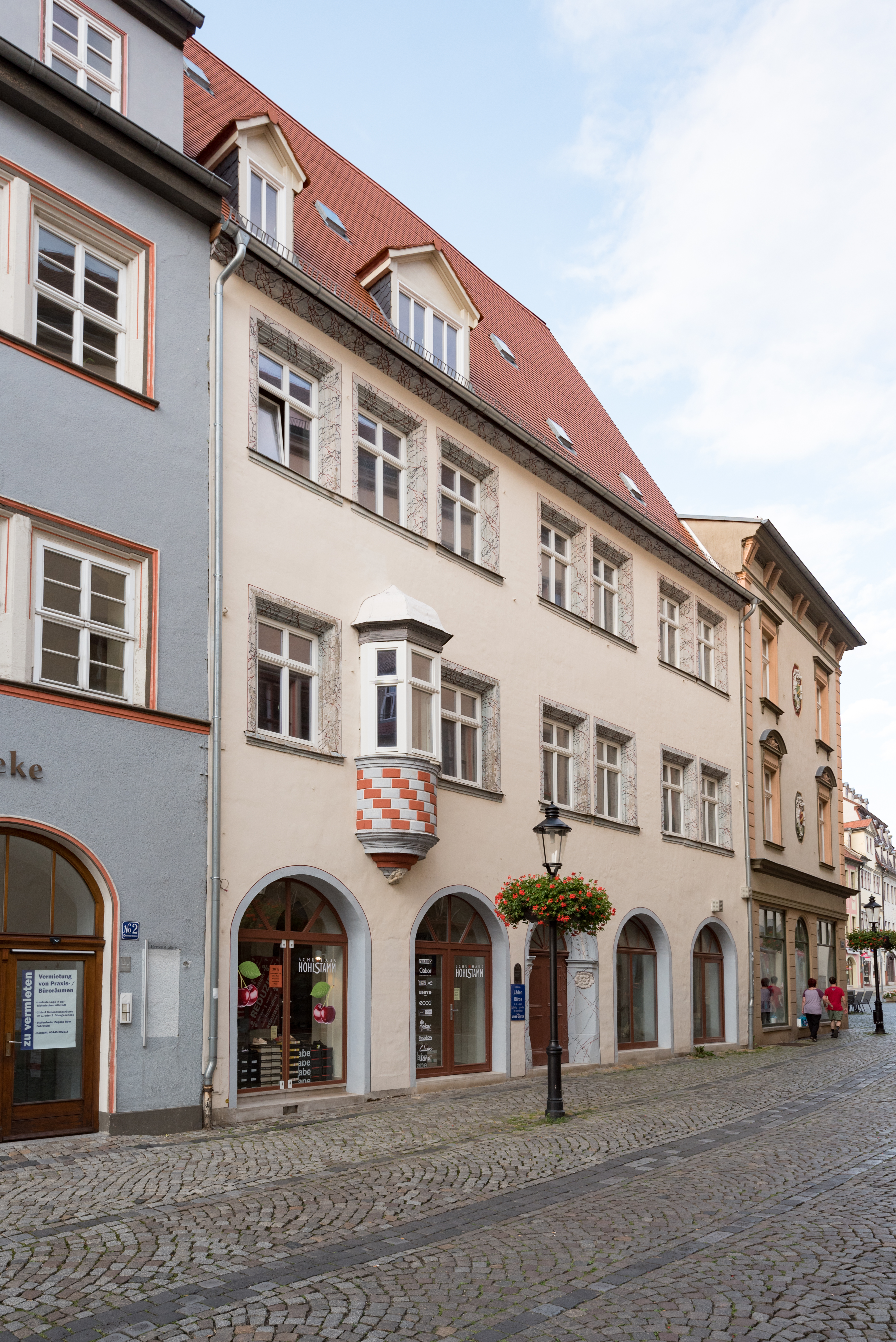 Naumburg (Saale), Herrenstraße 1